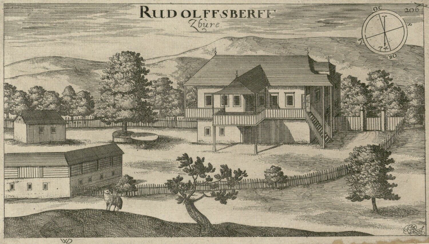 Dvorec Zbure